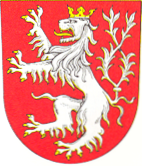 Kynšperk nad Ohří - znak města.